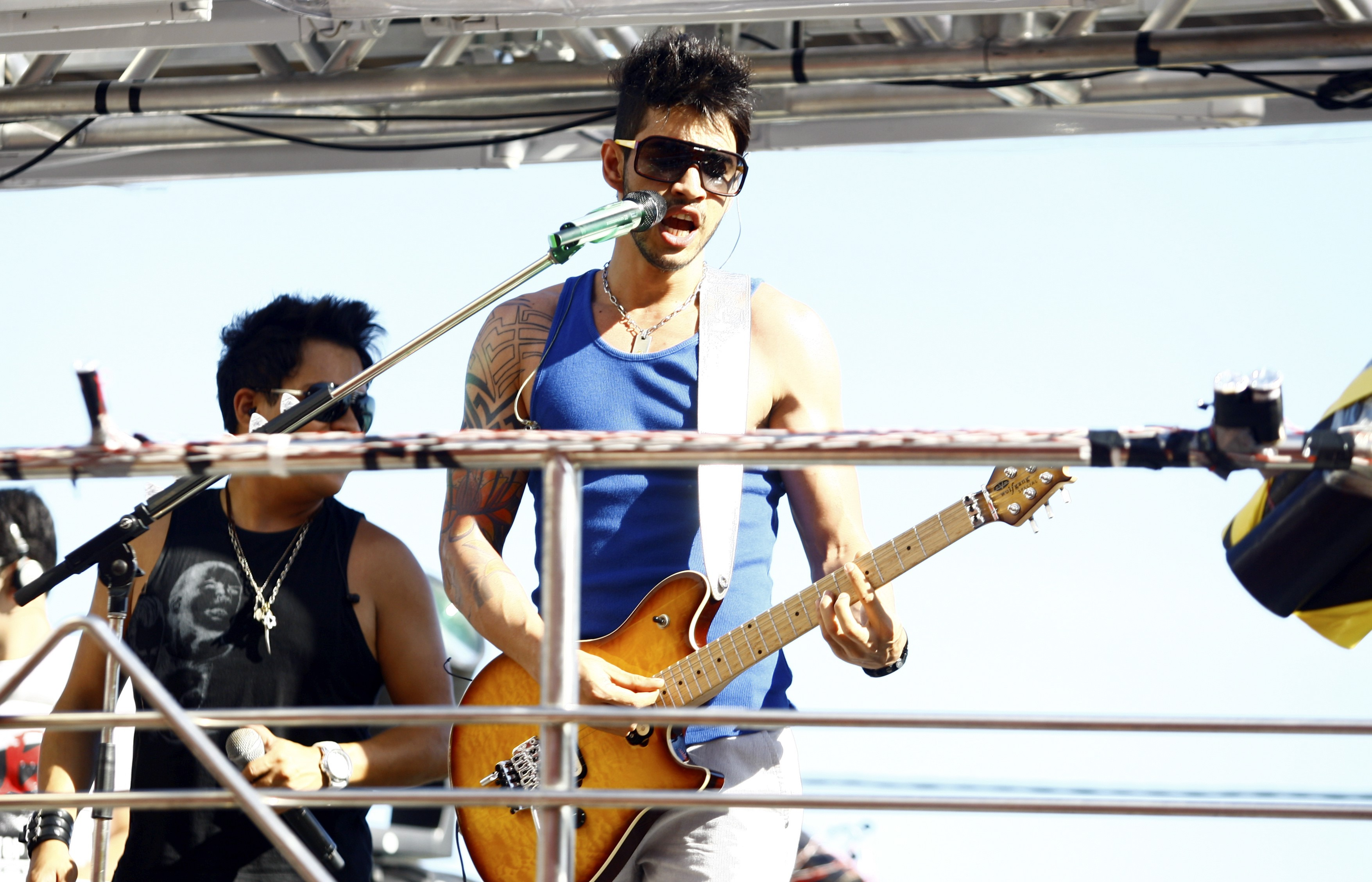 Gusttavo Lima no Bloco Fecundança no Circuito Dodô em 21 de fevereiro de 2012.